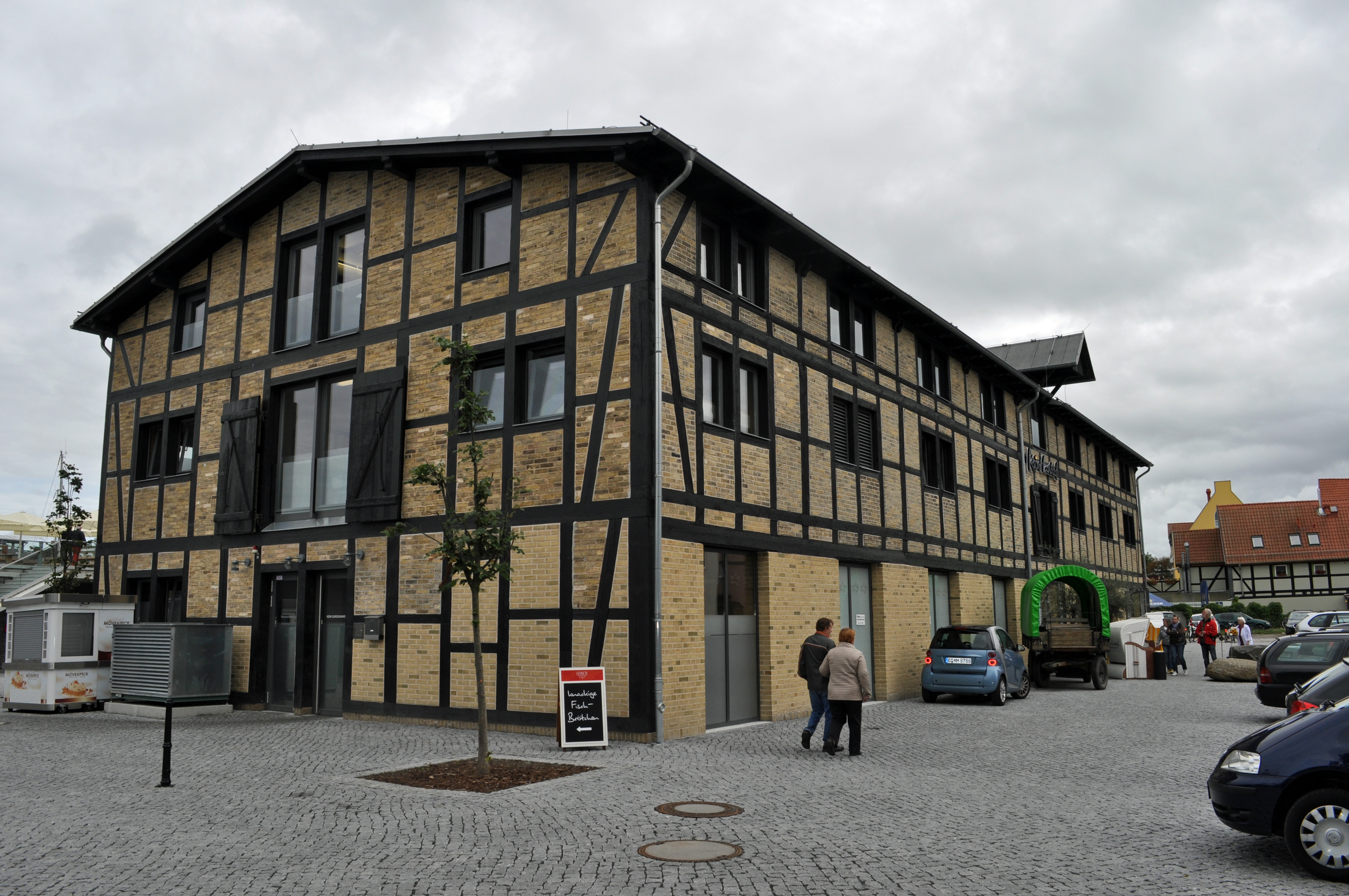 Stralsund, Am Fischmarkt 13, Kronlastadie (2012-09-15), by Klugschnacker in Wikipedia